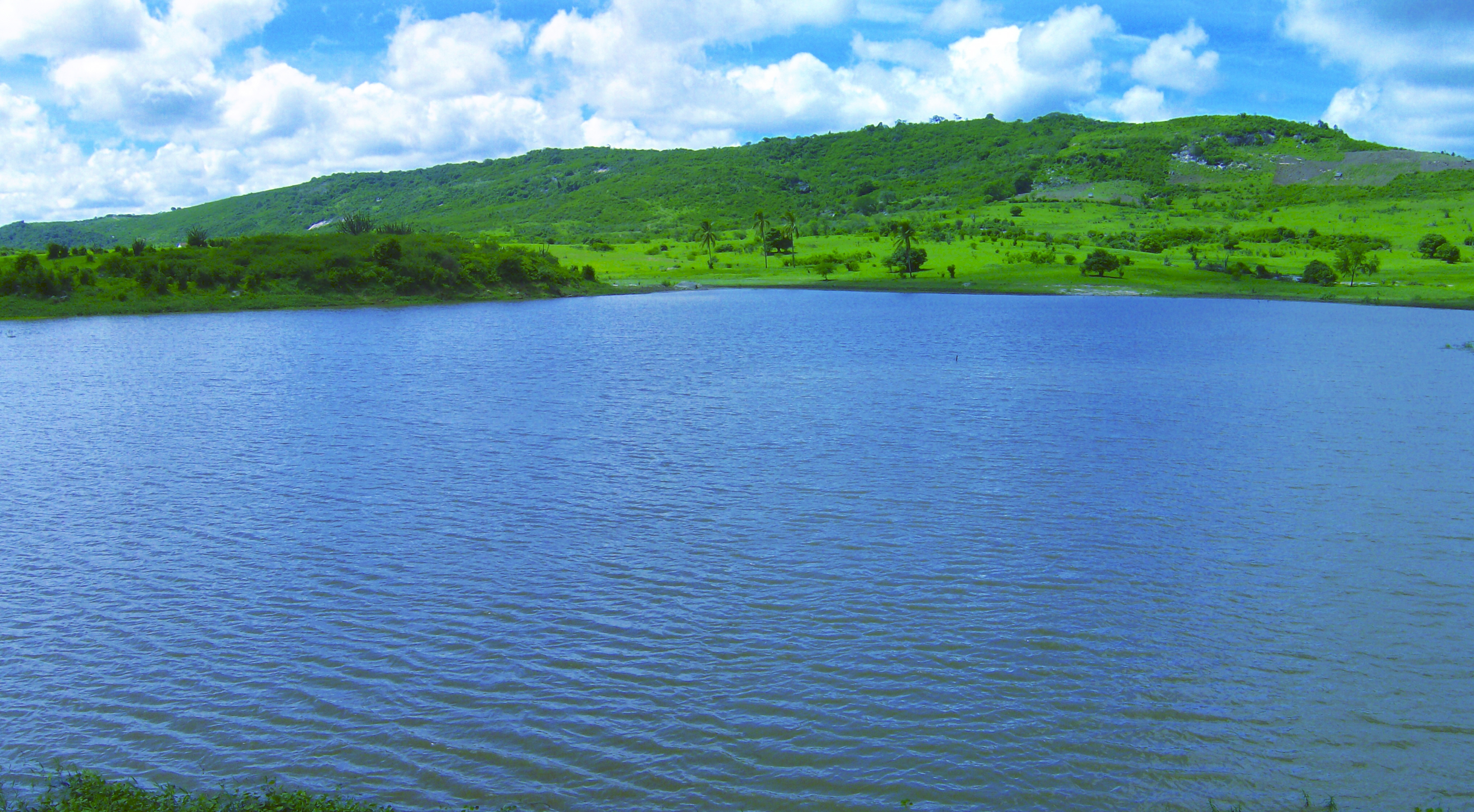 Açude Tribofe. Município de Belém, Paraíba.